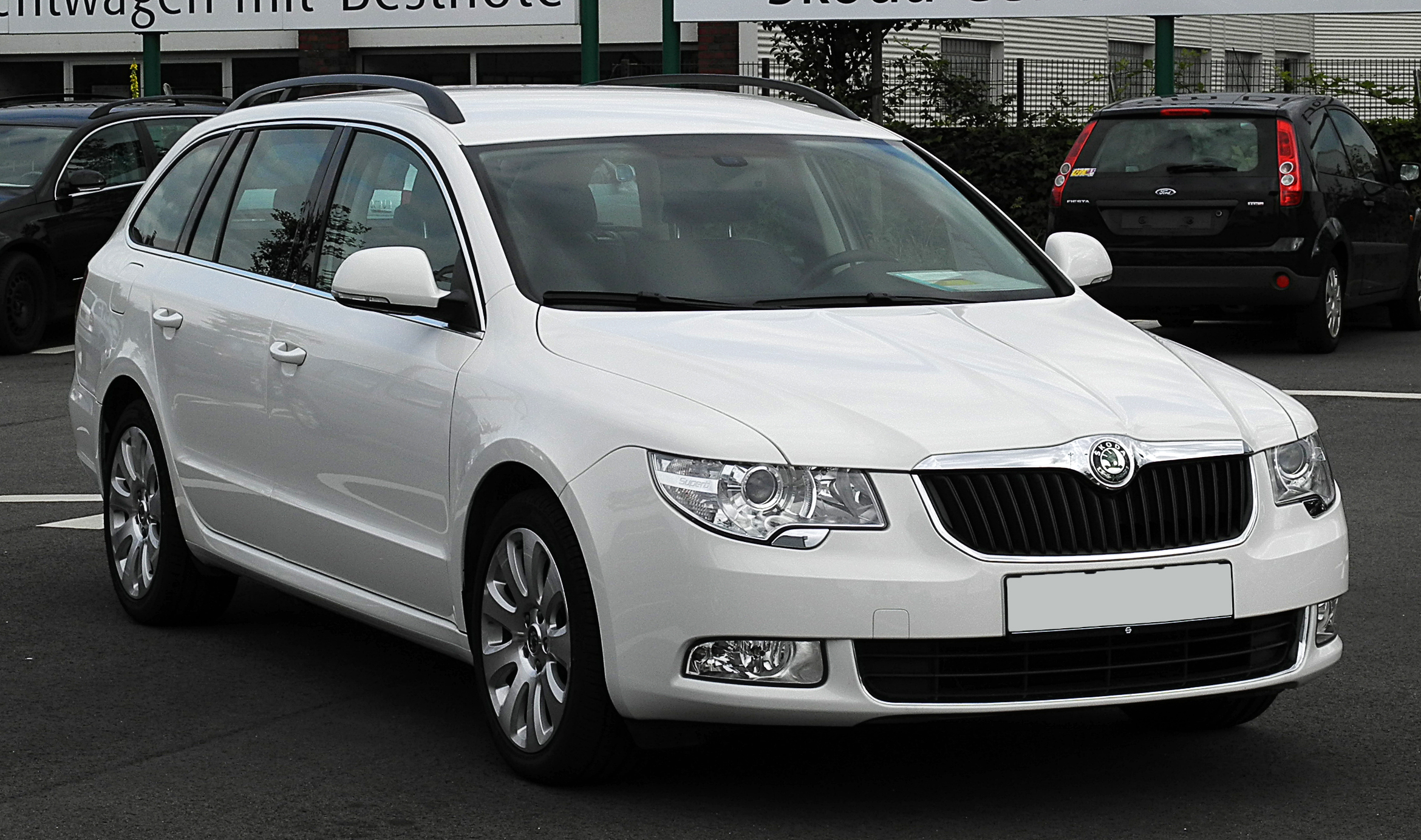 Skoda Superb Combi 2.0 TDI Ambition (II)